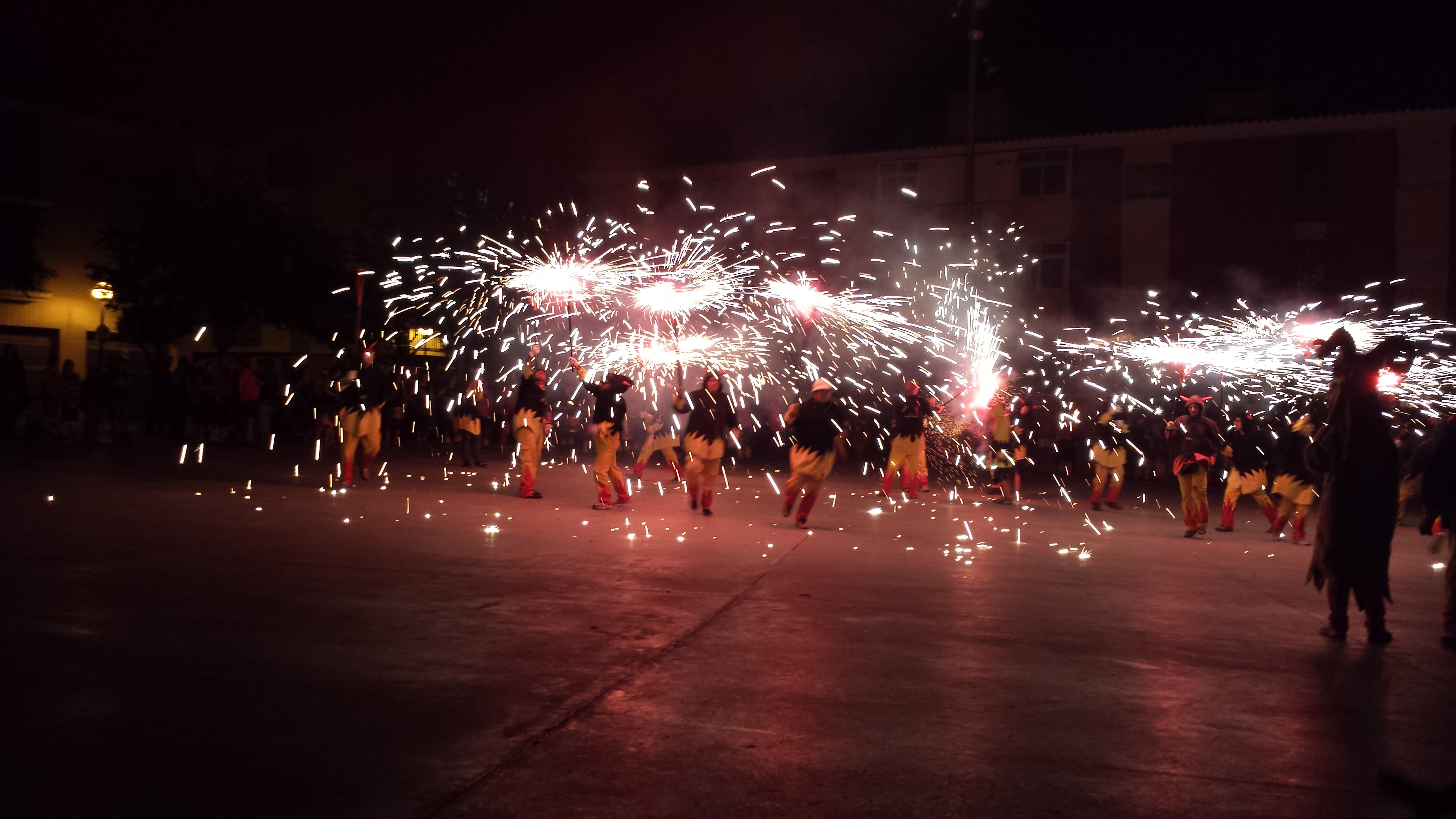 Foto realizada durante el espectáculo de fuego, realizado a cargo de los Diablos de Canovelles.